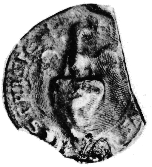 Verzameling Nederlandse zegels van voor 1300